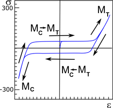 Graf plastické deformace u SMA